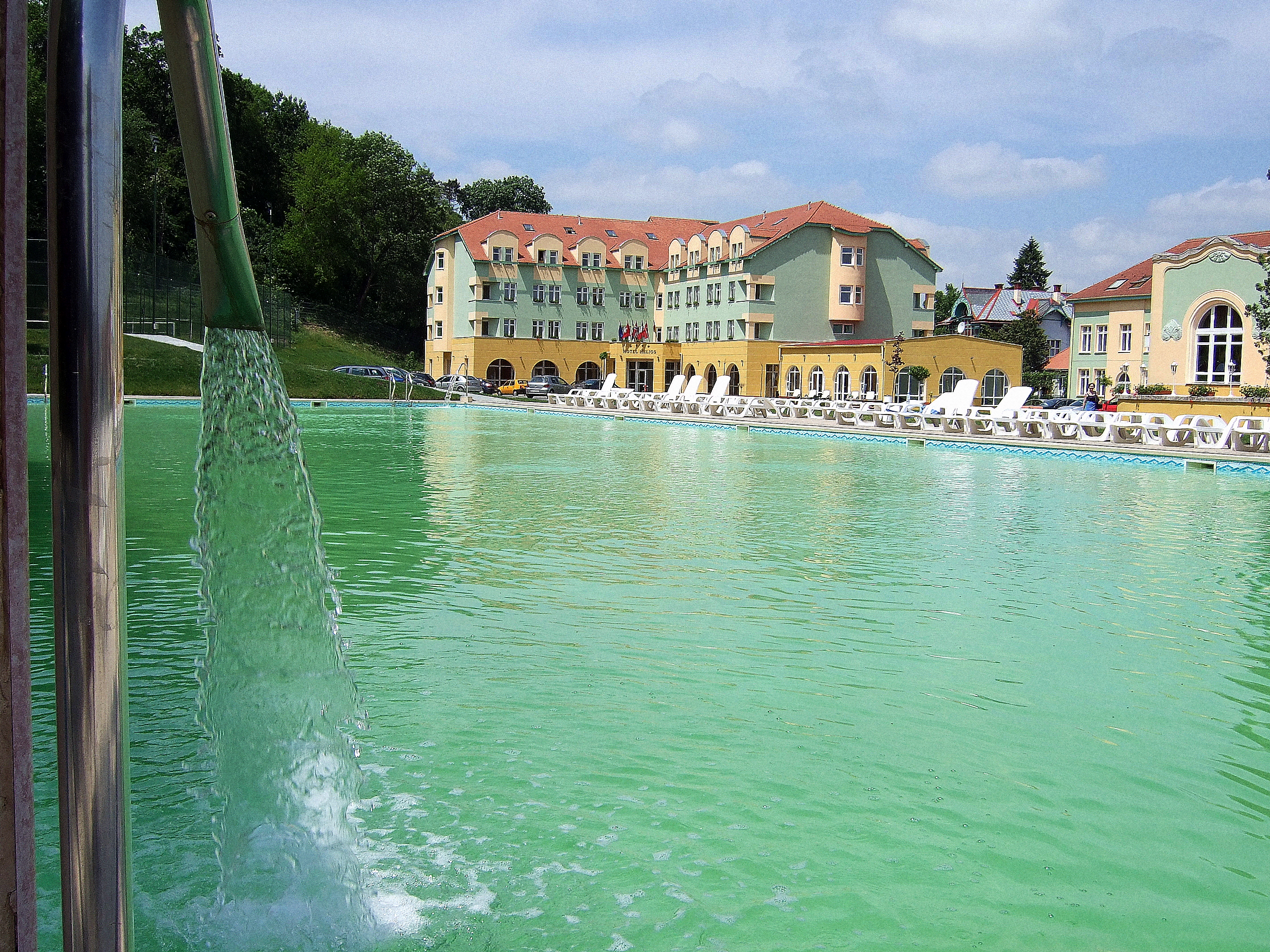 entretien